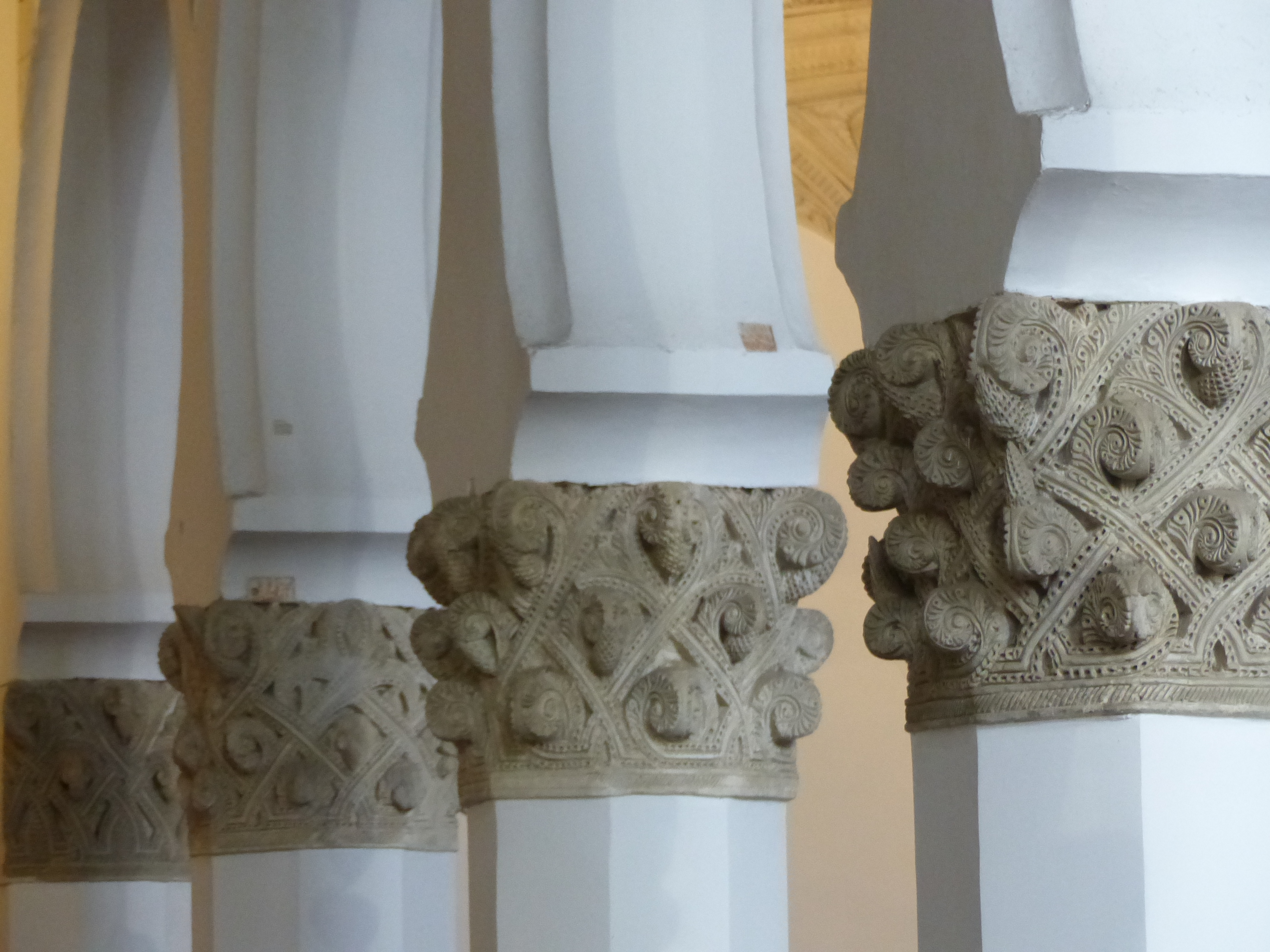 Santa María la Blanca, cuatro capiteles.